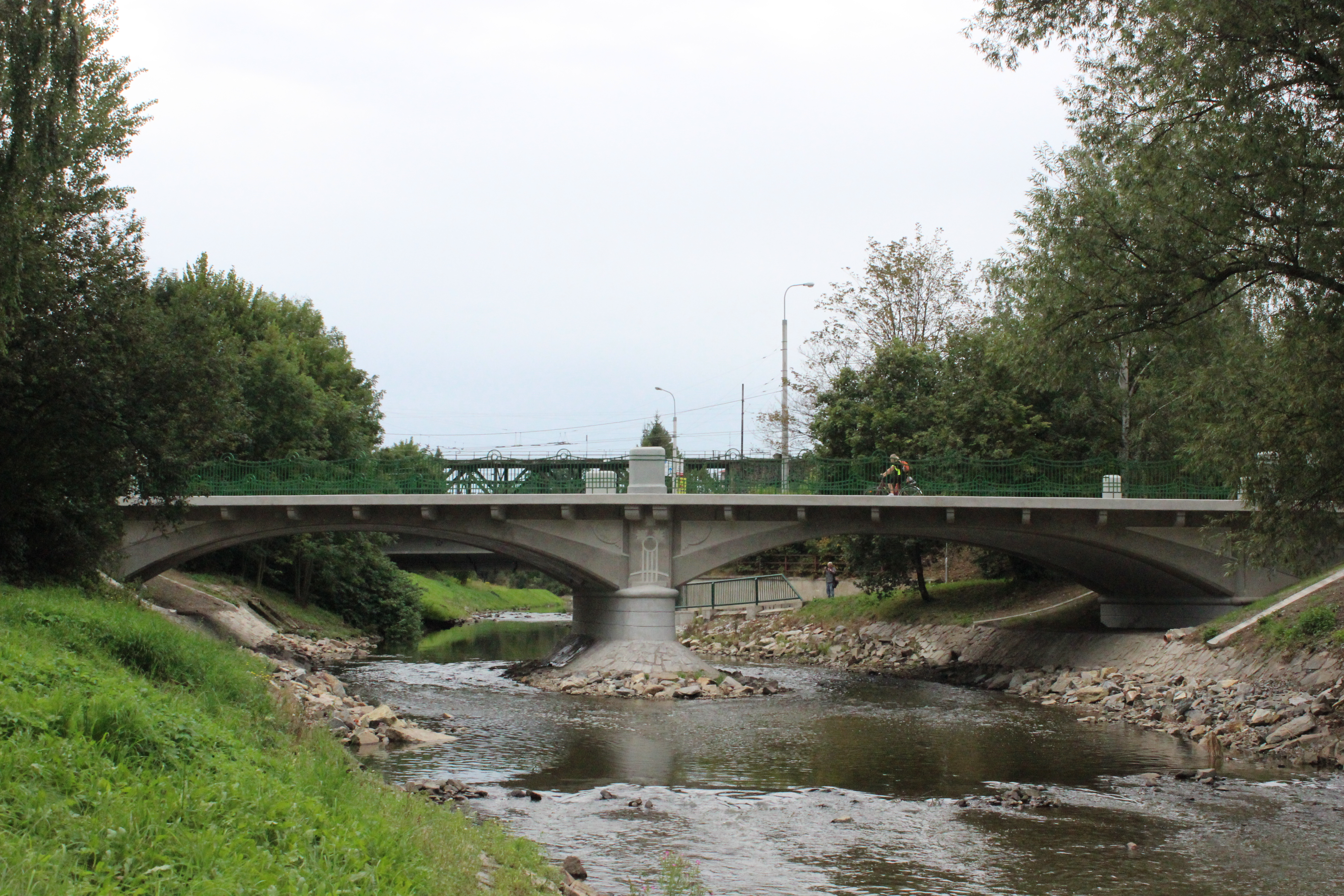 Silniční most U Jánů,Úvoz, (Jihlava)